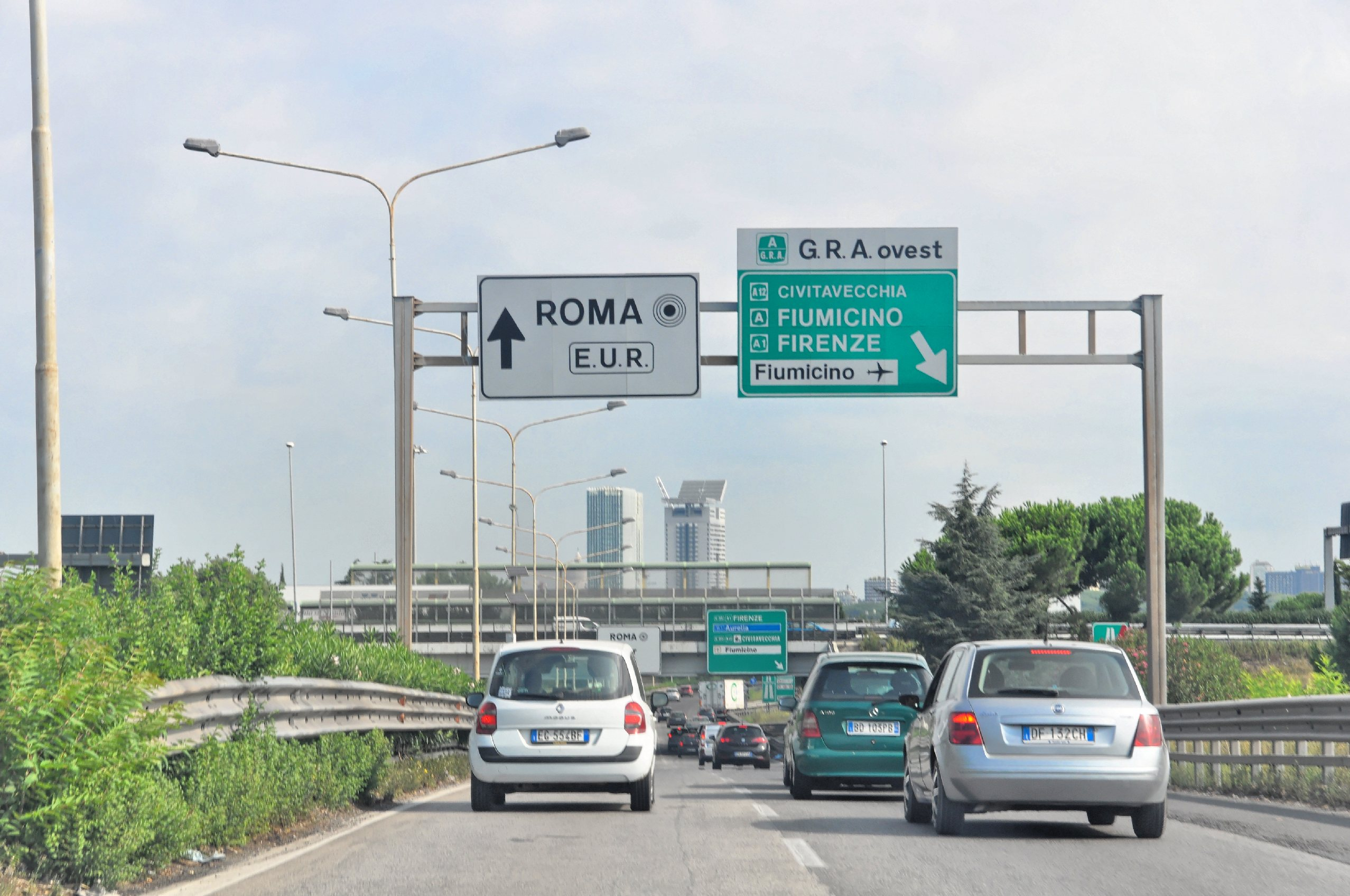 Bilder aus Italien 2015 es muss die Position noch bestimmt werden.